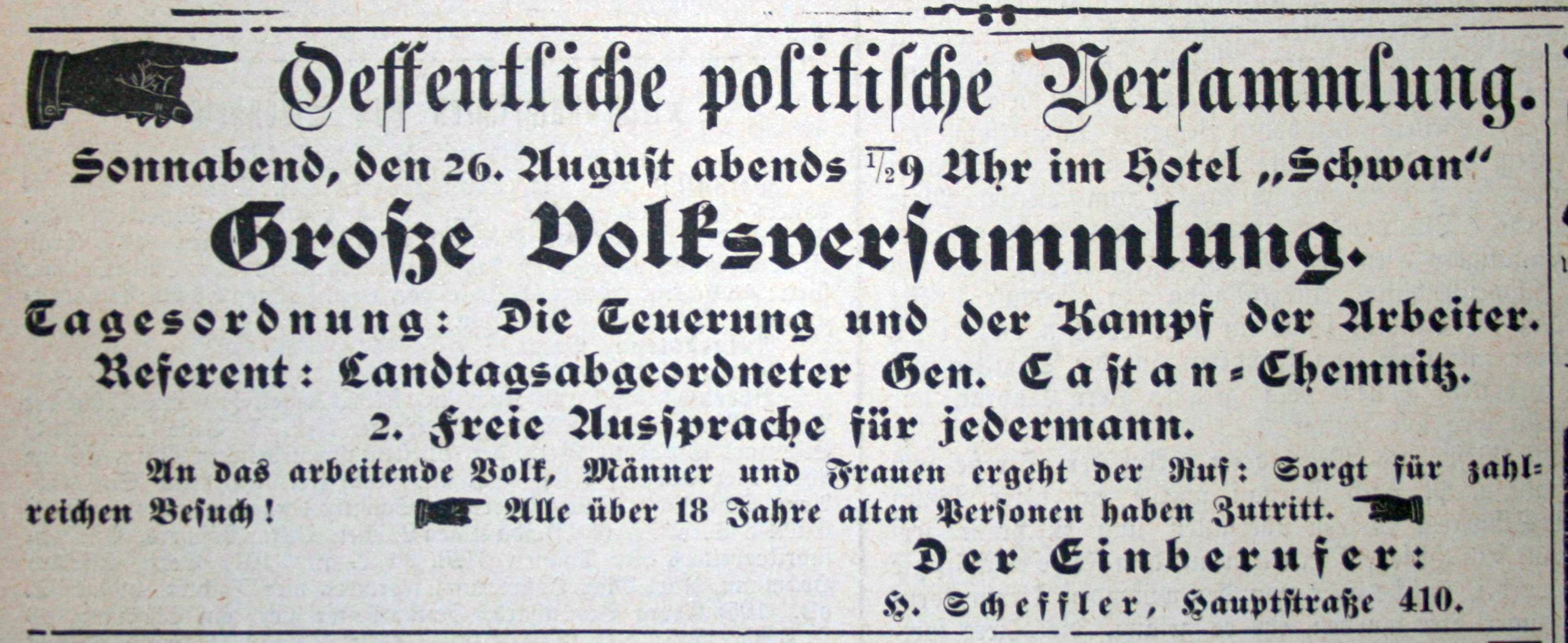 Schönheide im Erzgebirge: Das Mitglied des sächsischen Landtages Ernst Castan, Inhaber des Wahlbezirks Chemnitz 4, sprach am 26. August 1910 bei einer Veranstaltung im Hotel Schwan. Die Ankündigung nennt nicht eine Partei als Veranstalter. Ernst Castan war Mitglied der SPD. Obwohl die Veranstaltung an einem Sonnabend war, wurde erst auf 20.30 Uhr eingeladen: Damals war es selbstverständlich, dass sonnabends in den Fabriken und anderswo gearbeitet wurde. Danach waren häusliche Arbeiten wie das Ausmisten des Kaninchenstalls (und das Reinigungsbad) zu erledigen. So konnte auf 20.30 Uhr eingeladen werden. – Eine Anzeige im Schönheider Wochenblatt.